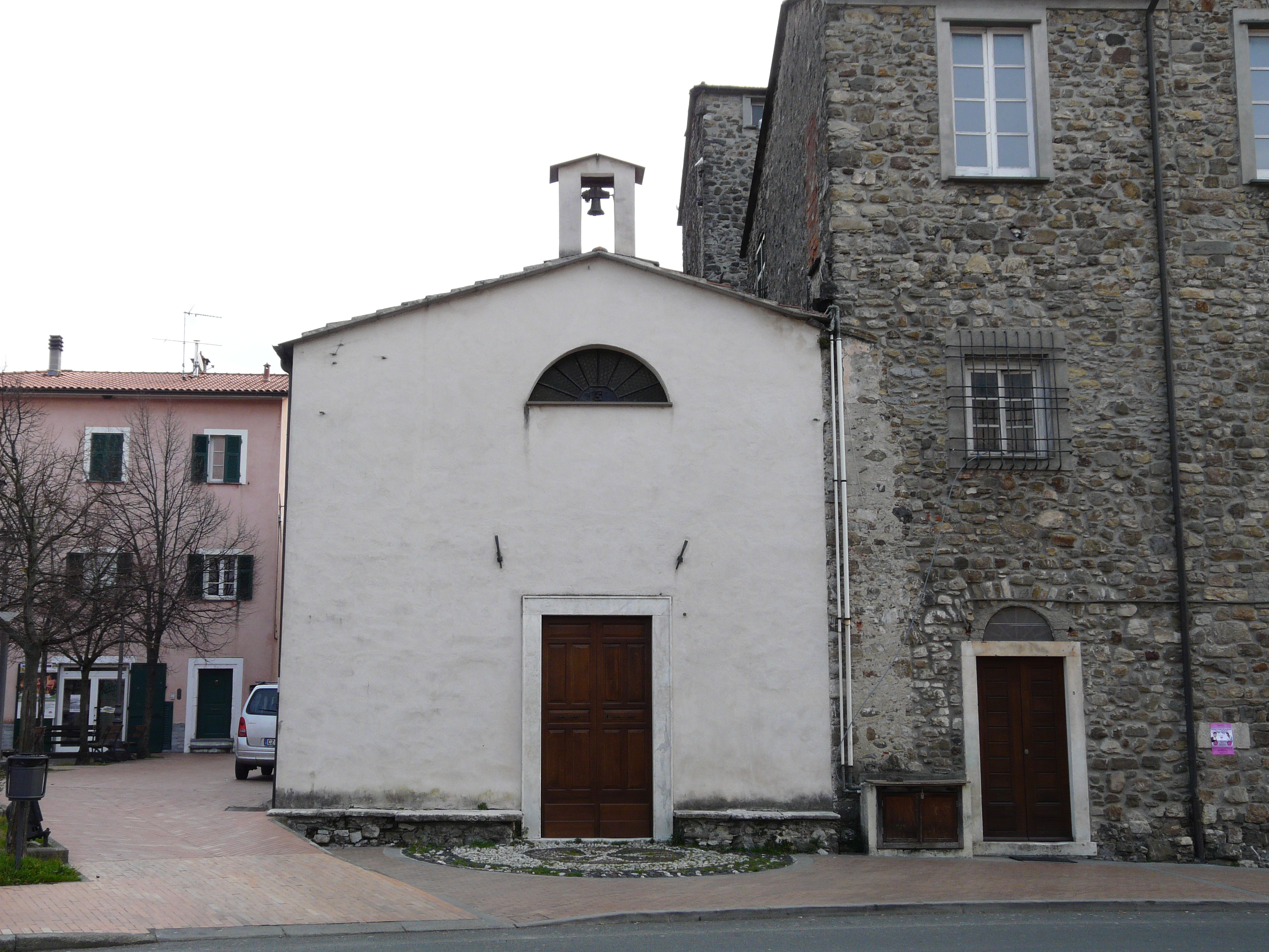 Cappella del castello Giustiniani, Ceparana, Bolano, Liguria, Italia